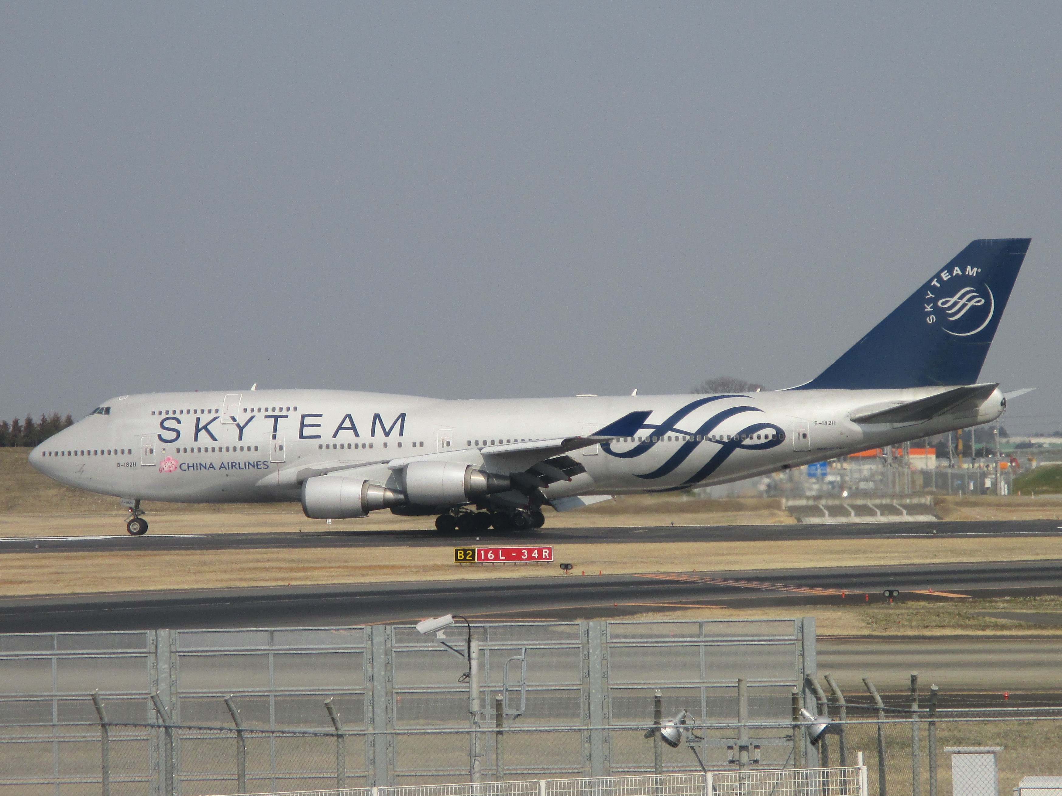 成田国際空港で撮影。